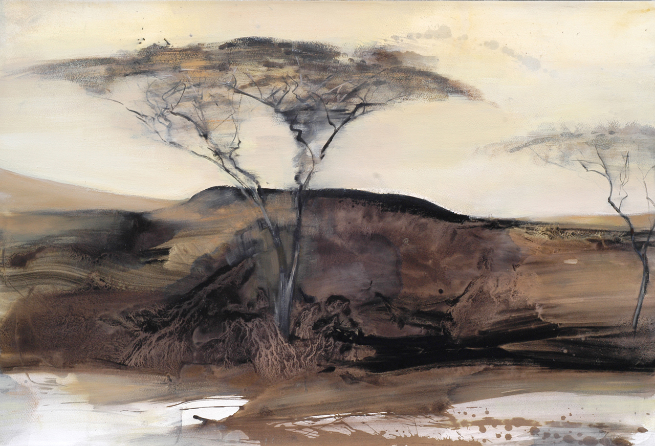 Franta, Africká krajina (2003), barevná tuš a kvaš na papíru 75 x 110 cm